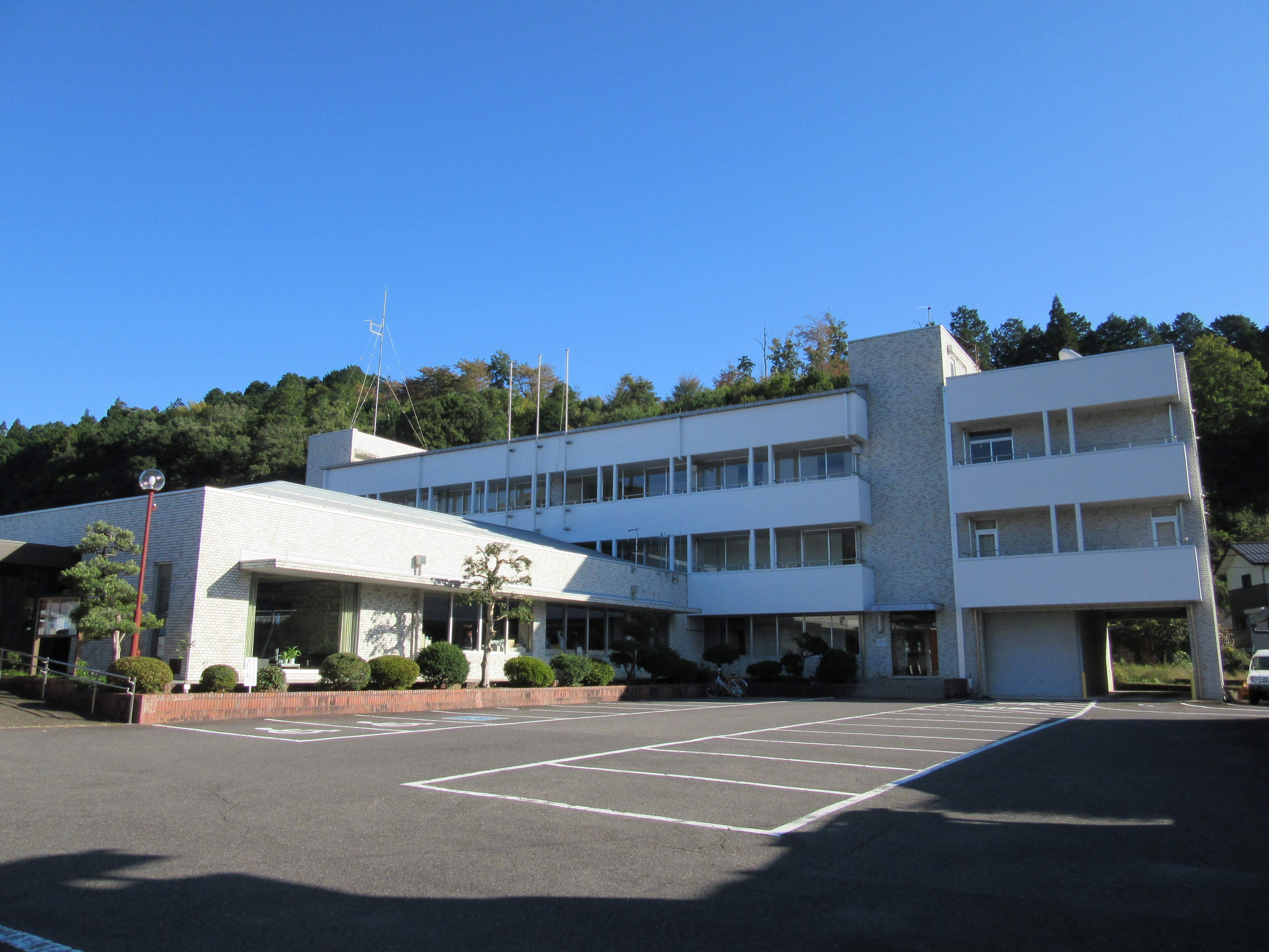 郡上市役所美並振興事務所